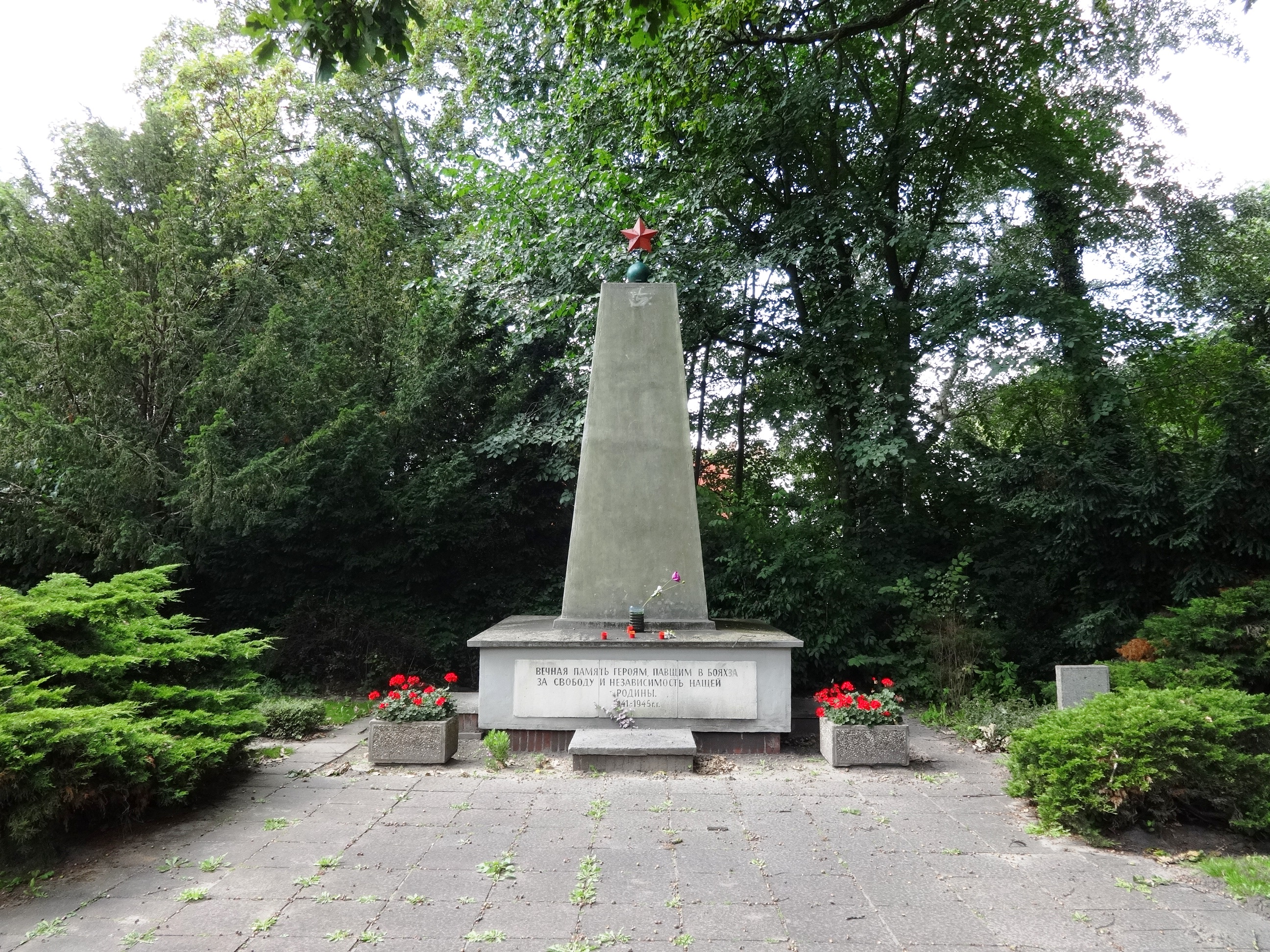 Kriegsgräberstätte in der Fleischerstraße Ecke Bahnhofstraße in Greifswald, Mecklenburg-Vorpommern